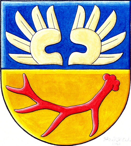 Znak obce Markvartice (okres Jihlava)